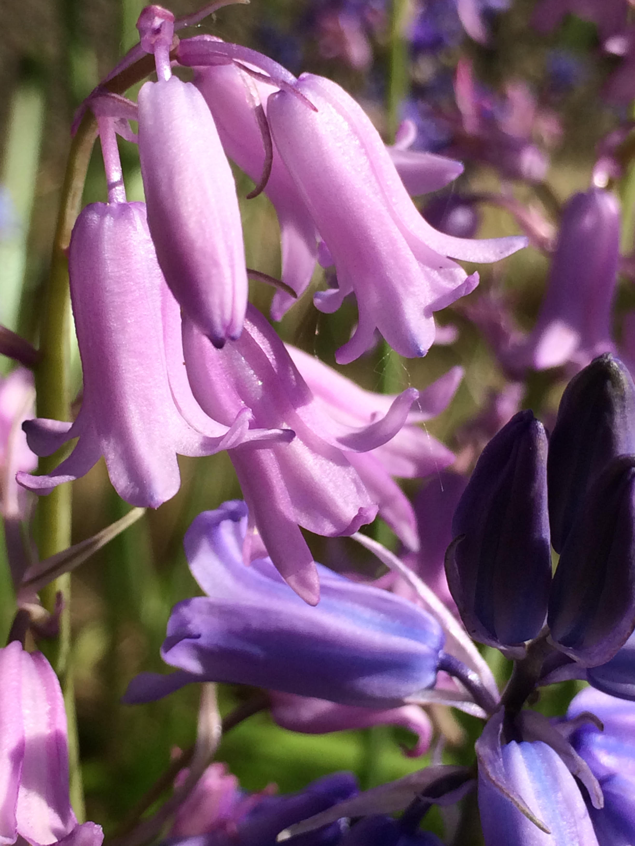 Foto prenita en la ĝardeno de Petro De Smet okaze de vizito